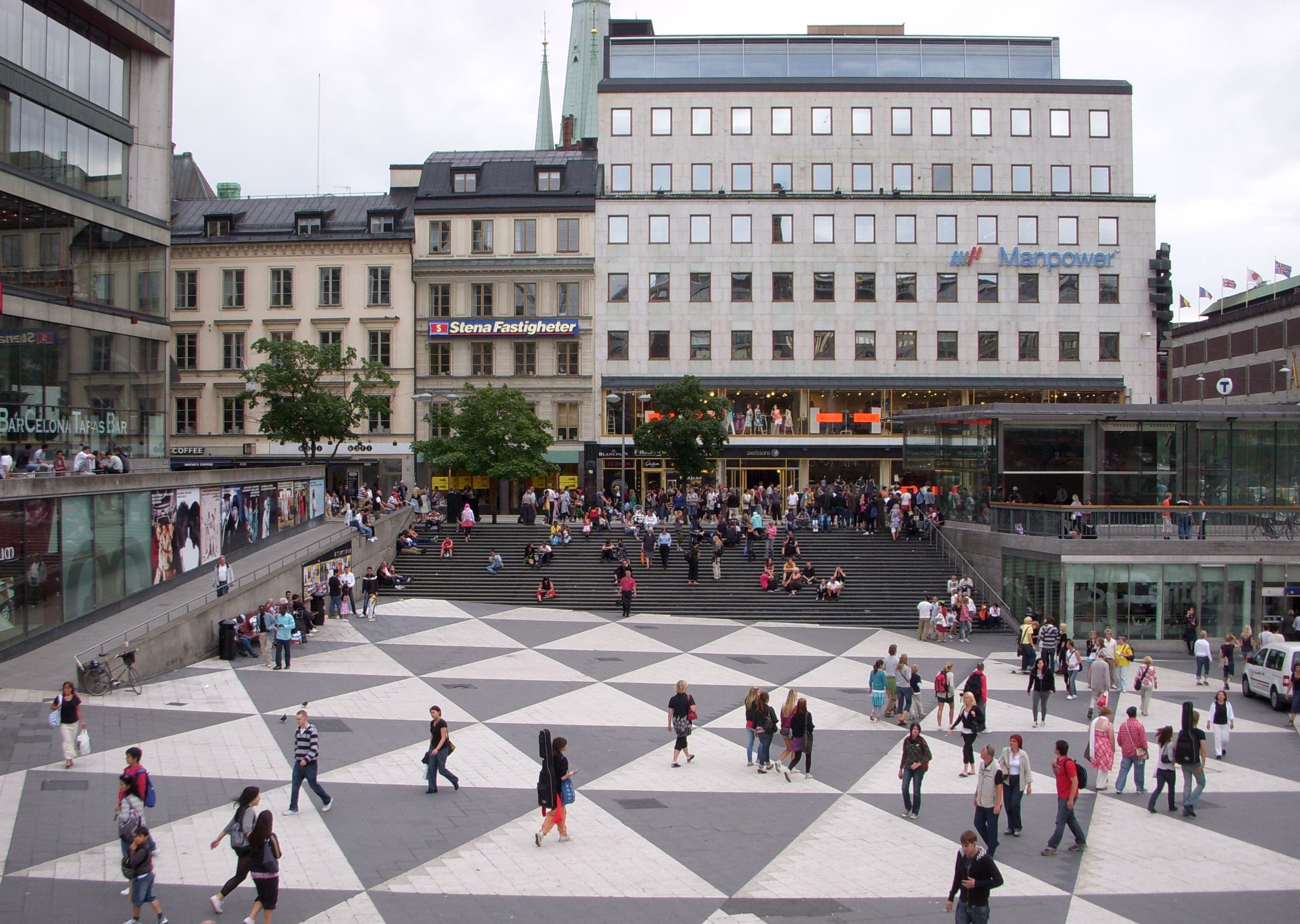 Segels torg mot väst och trappan